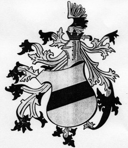 Erb rodu pánů z Hustiřan